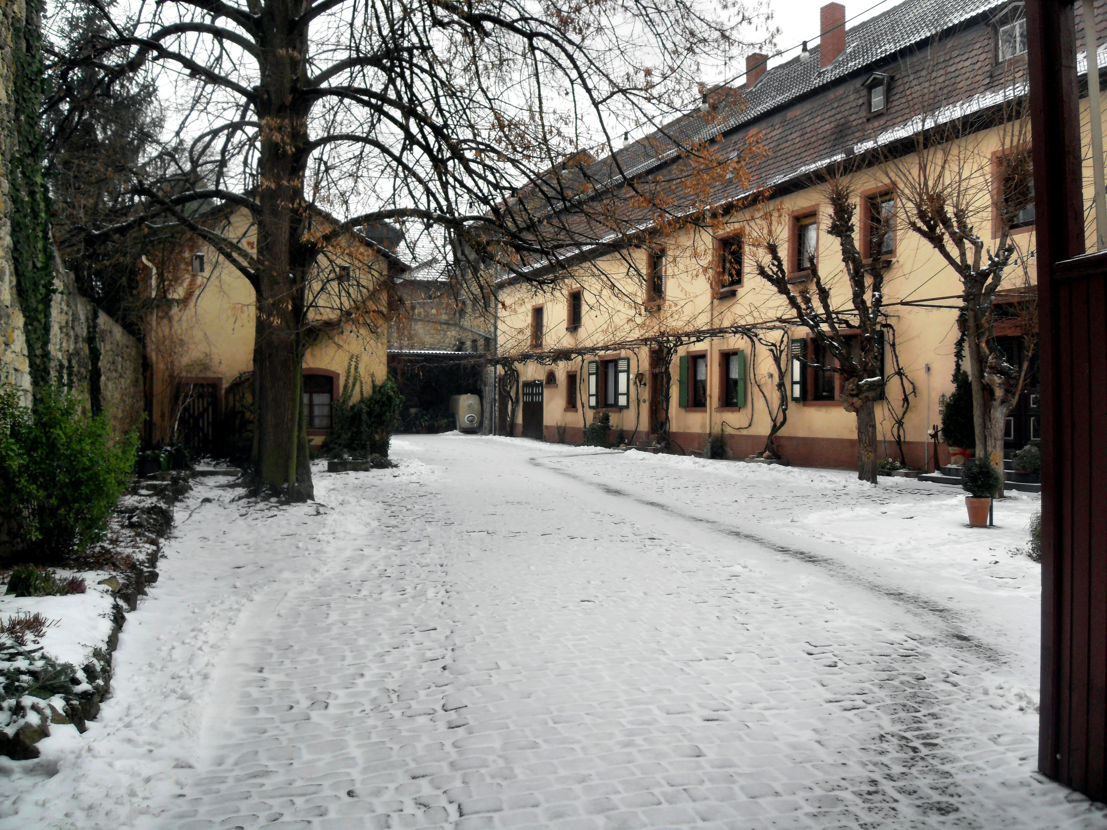 Der Hof des Homburger Hofs im rheinhessischen Guntersblum in Deutschland.